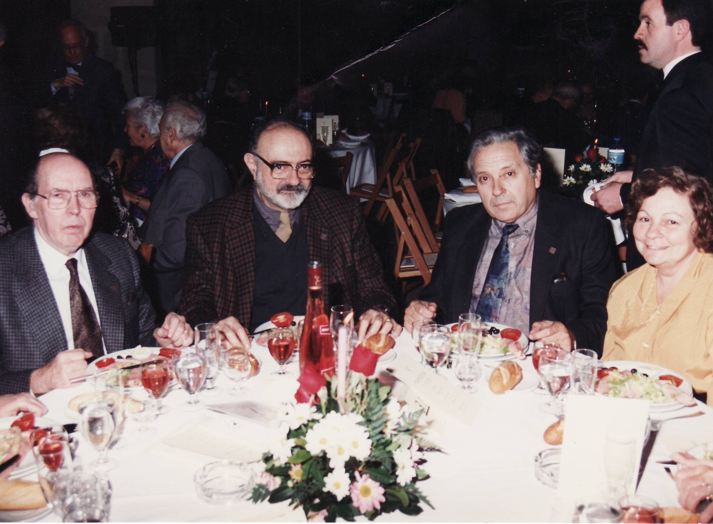 Josep Tremoleda, Anna Pàmies, Joan Triadú i J. Sarsanedes durant un sopar homenatge a Ramon Aramon i Serra (1993, Drassanes de Barcelona)